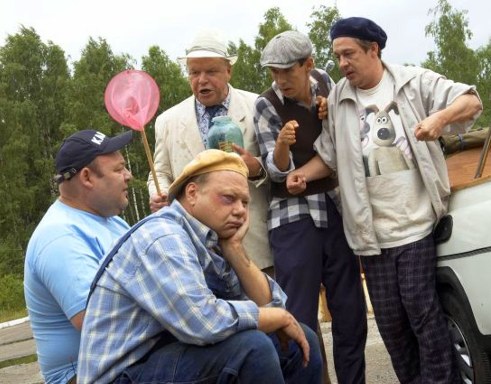 Фото со съемок кинокомедии «Святое дело». Стоят (слева направо) Михаил Кокшенов, Алексей Панин, Михаил Ефремов. Сидят: Александр Пашковский (слева) и Сергей Бачурский (справа).